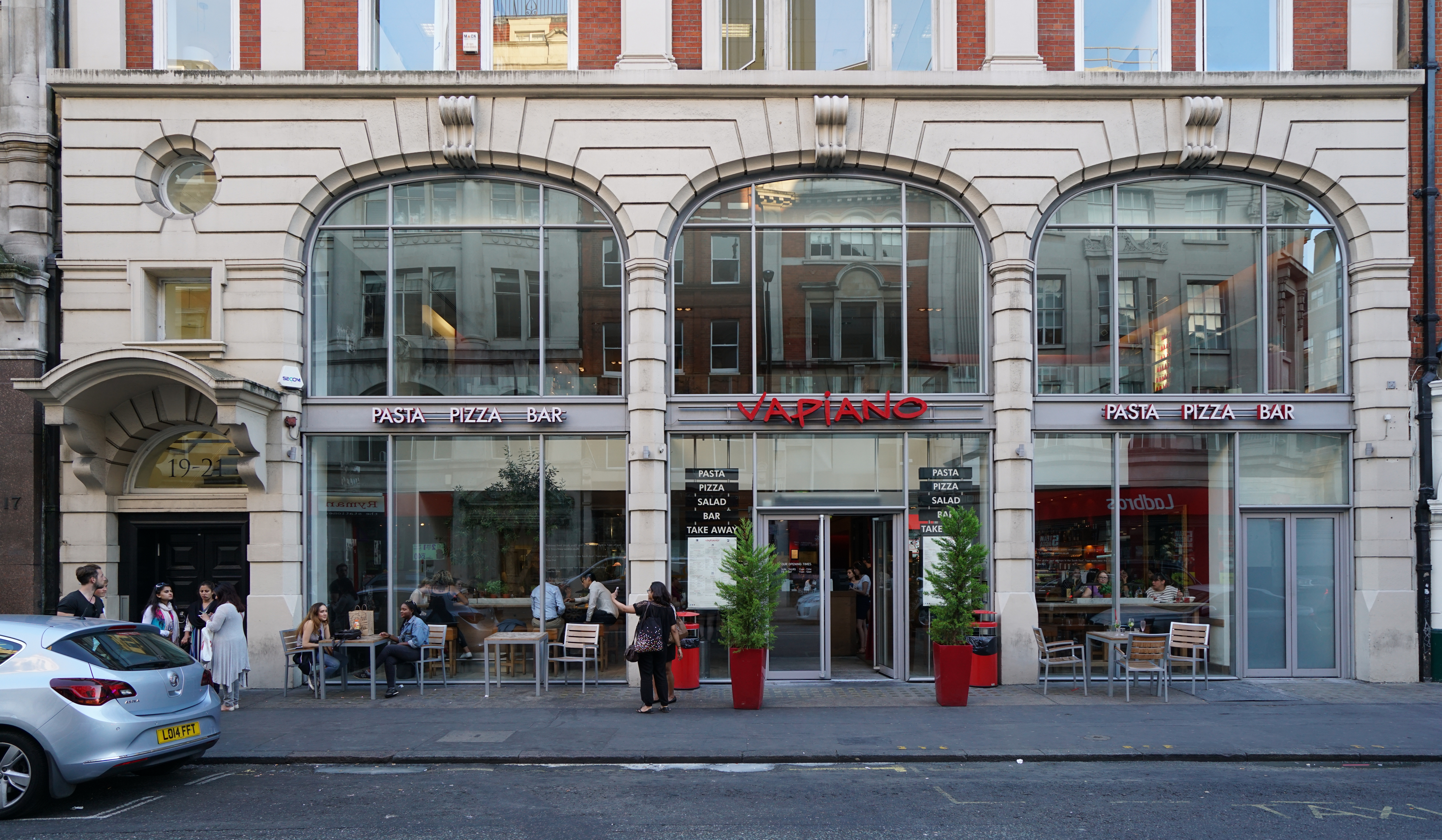 Das Vapiano-Restaurant in Marylebone in der City of Westminster in London von der Great Portland Street aus